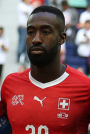 Сборная Швеции зрелищно вышла в четвертьфинал ЧМ-2018